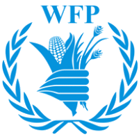 Logo Światowego Programu Żywnościowego